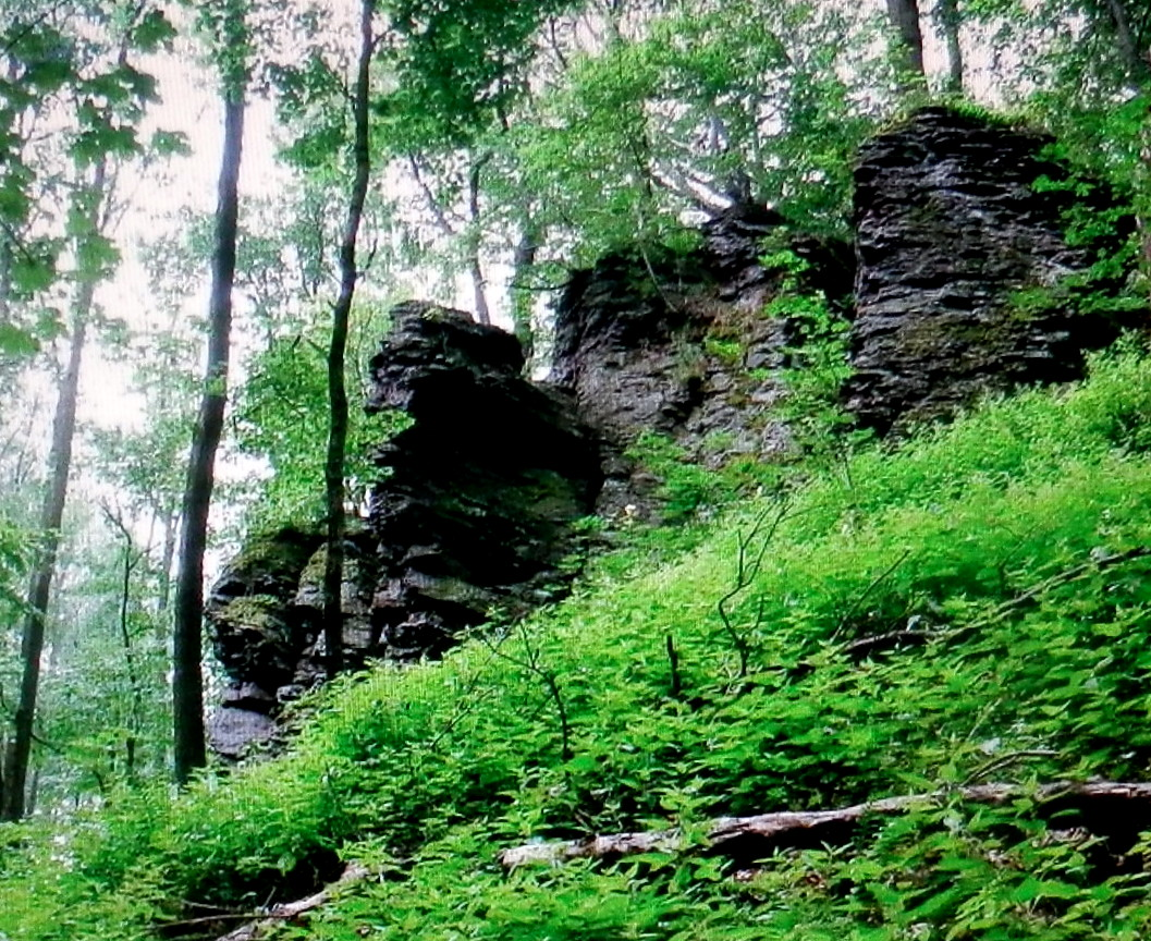 Slanské vrchy, skalné bralo a ruiny hradu Bodoň.